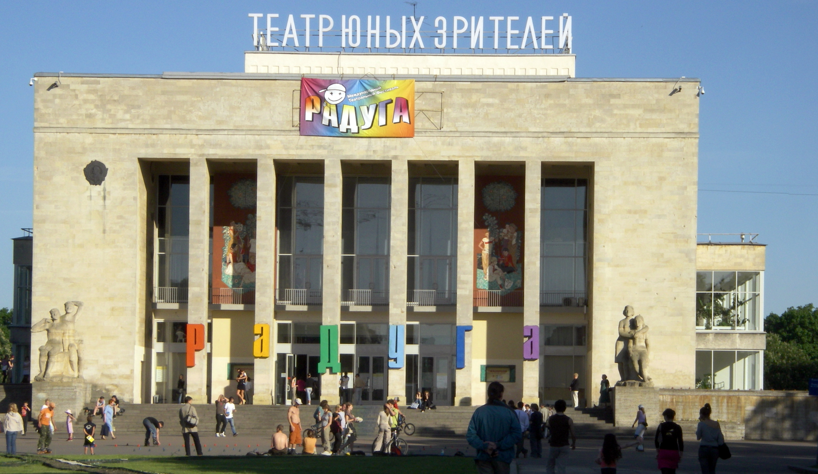 Театр Юнного Зрителя (ТЮЗ), Санкт-Петербург.